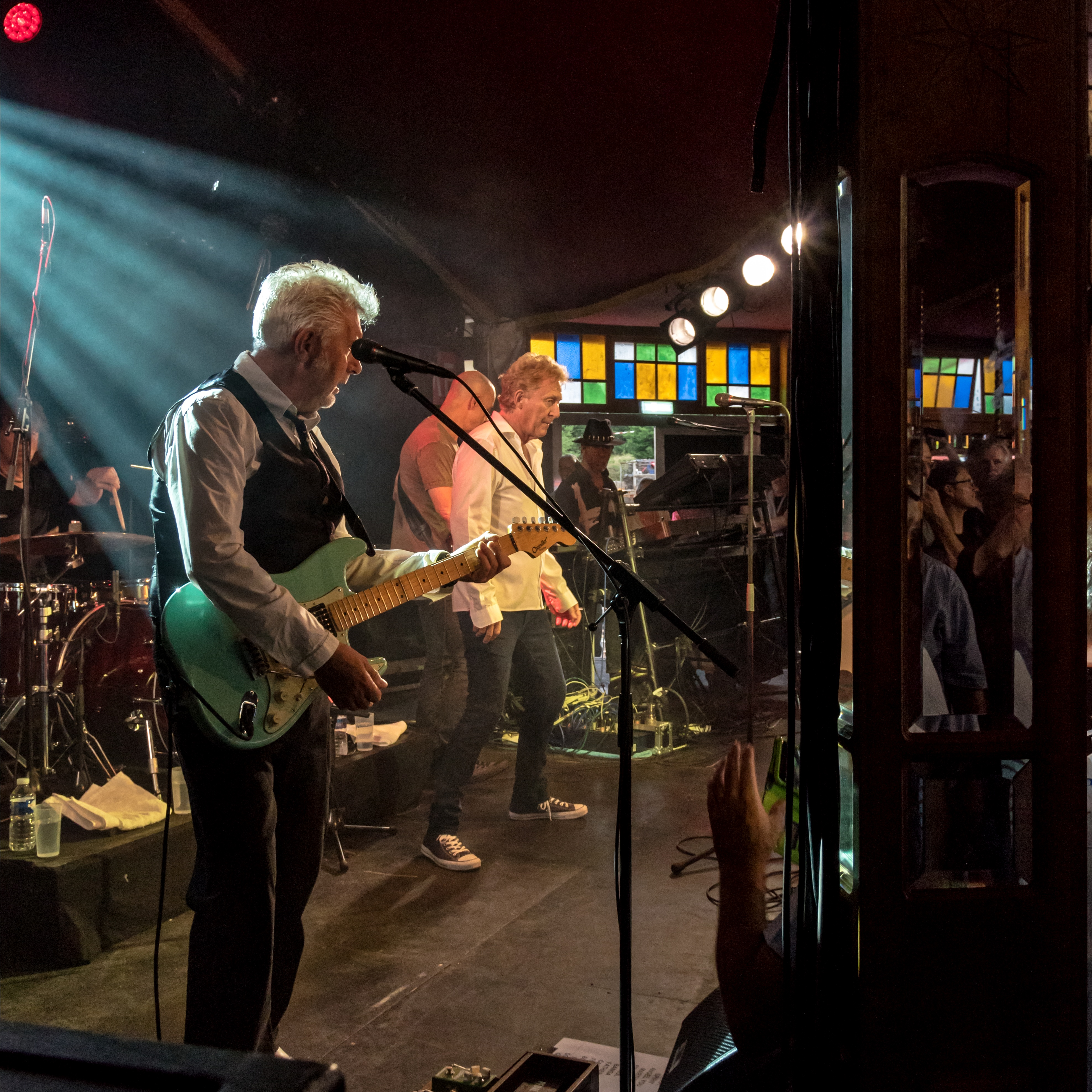 Bilder vom Zelt Musik Festival 2017 in Freiburg im Breisgau